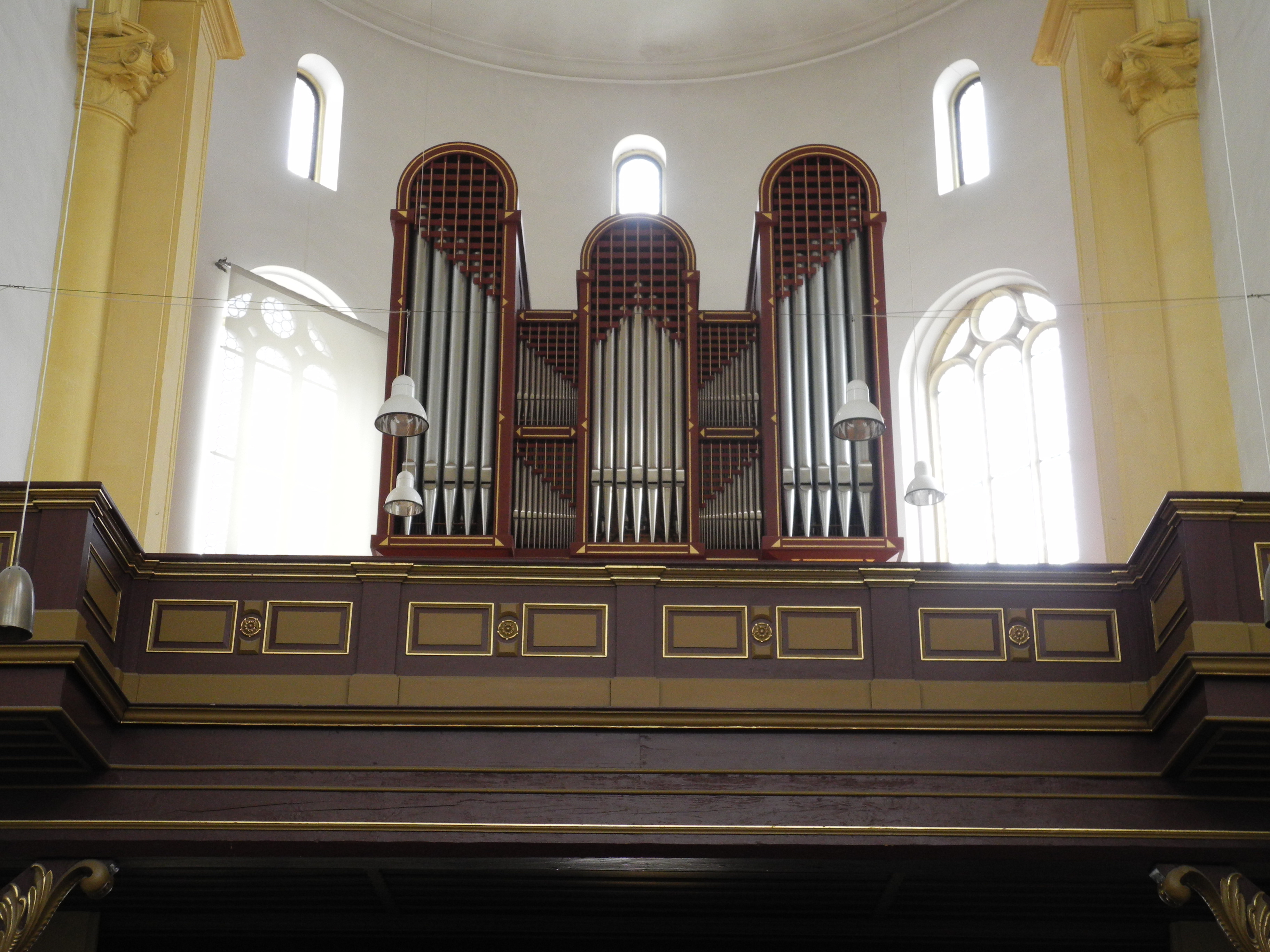 Regensburg, Neupfarrkirche, Orgel, erbaut 1986 von Georg Jann (41/III/P)